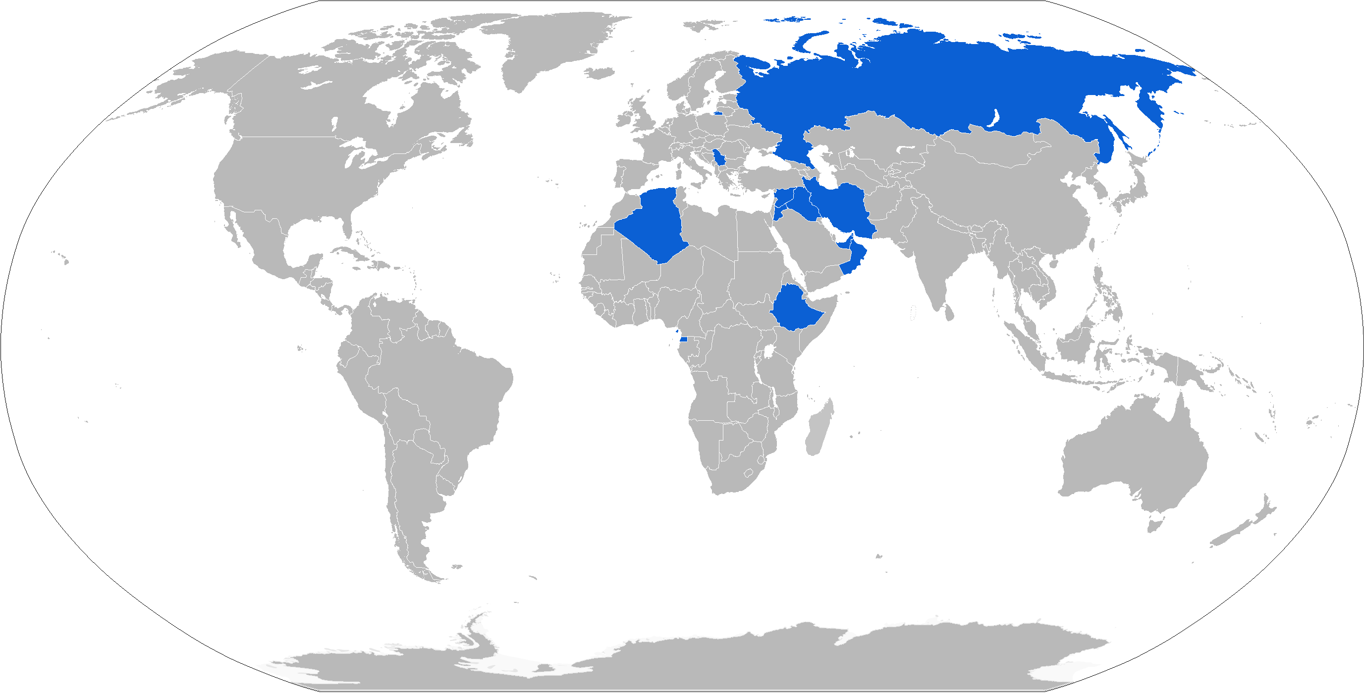 Оператери ПВО система Панцир руске производње, обележено плавом бојом